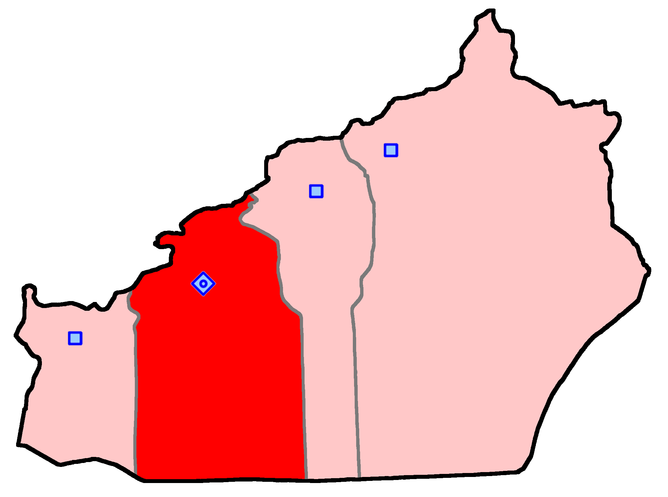 =حوزهٔ انتخاباتی سمنان برای انتخابات مجلس شورای اسلامی